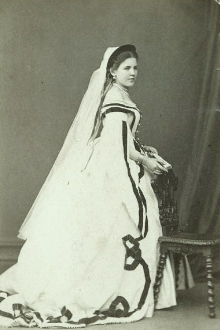 Елизавета Владимировна Сабурова (1847-1932), урожденная гр. Соллогуб.